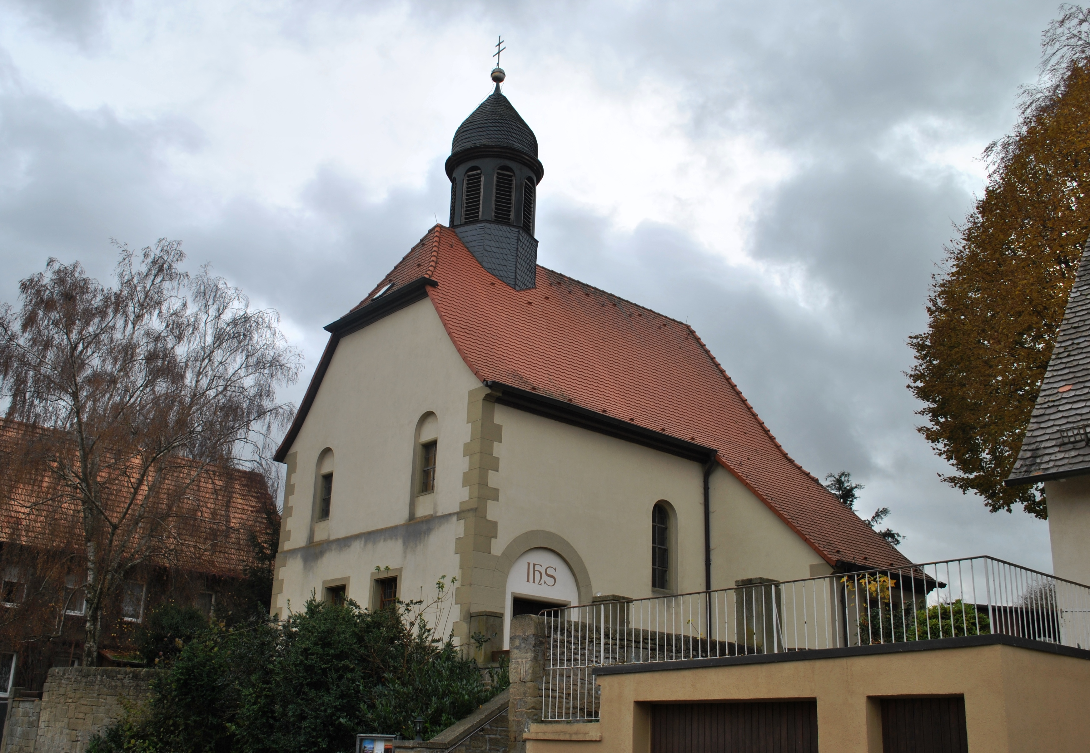 Kapelle schlichter Saalbau mit Halbwalmdach und Dachreiter, 19./20. Jahrhundert